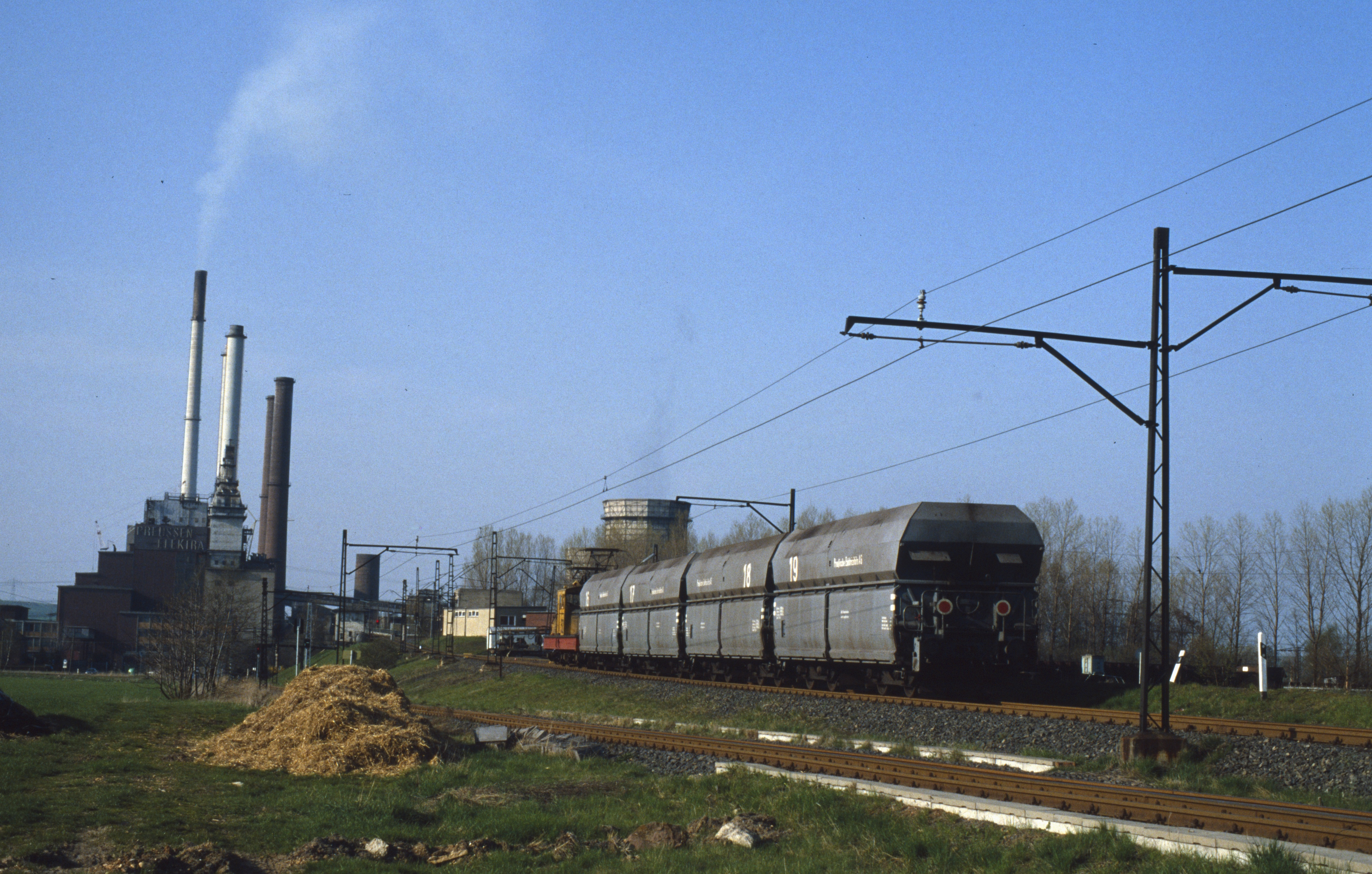 Normalspurlok 52 (Krupp 1957) auf dem Weg zum Kraftwerk Borken, Hessen, 24.4.1987